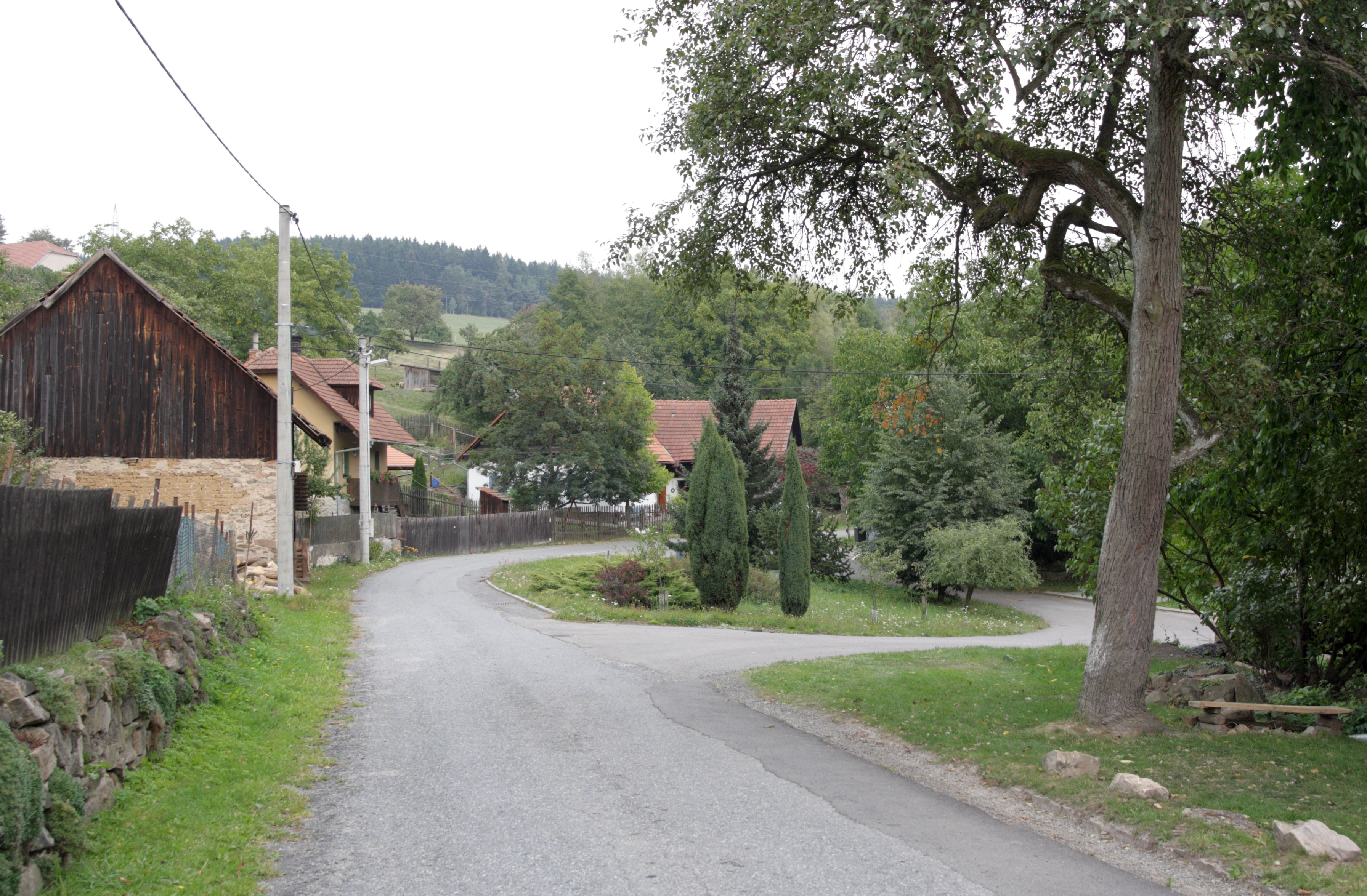 Moravecké Pavlovice - náves.